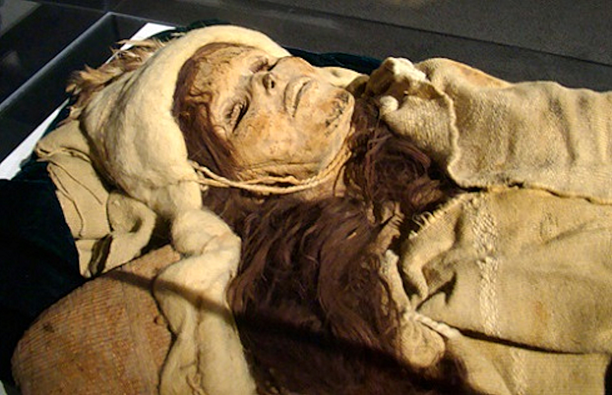 "Tarim" nő